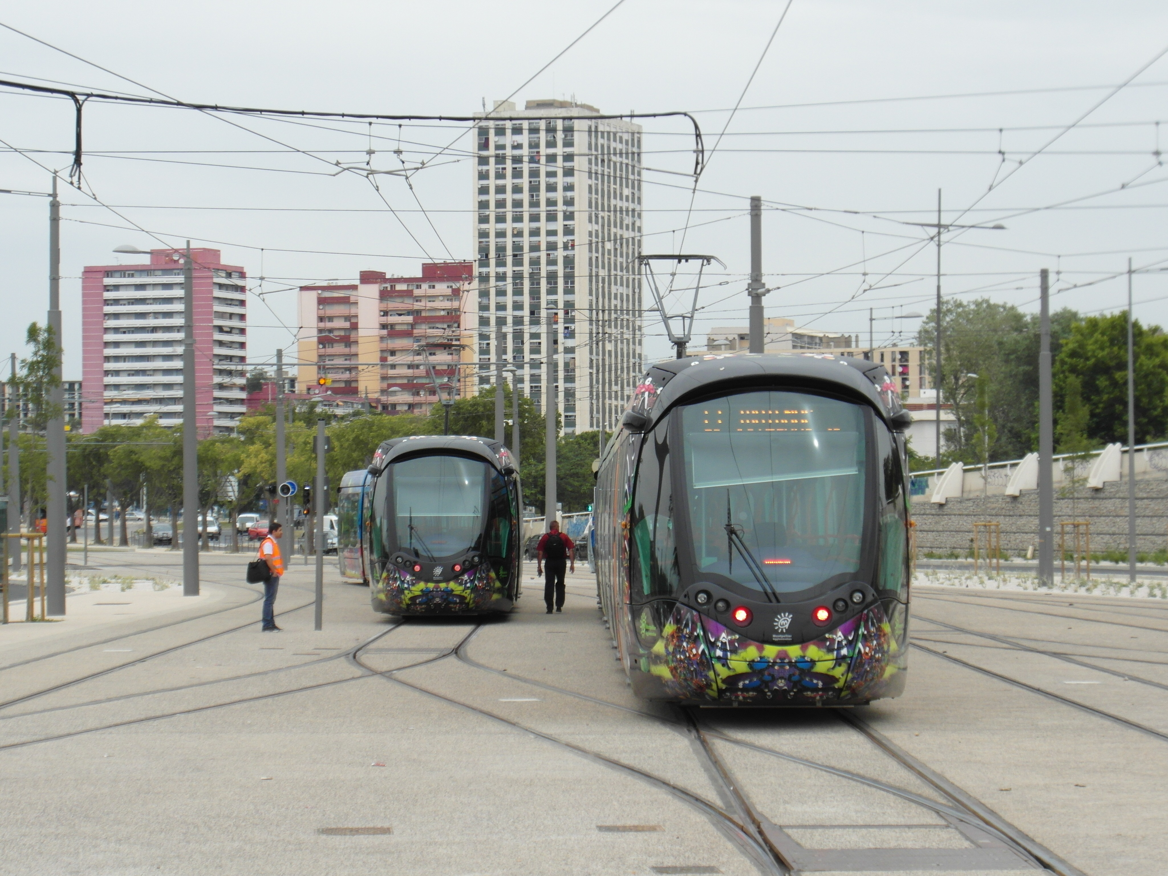 Montpellier - Tramway - Ligne 3 - Centre-Ville - Juvignac